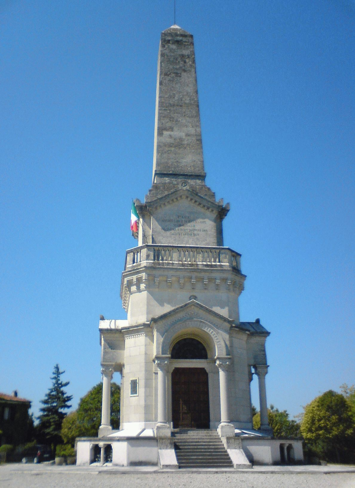 Monumento Ossario di Custoza